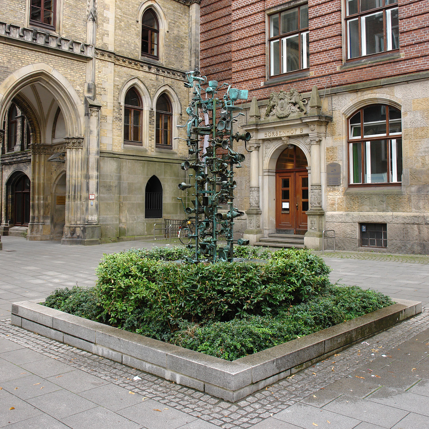 Bremen: Brunnen il gocciolatoio / Der Tröpfler. Daniel Spoerri 2004. Standort: Börsenhof k: kunst im öffentlichen raum bremen